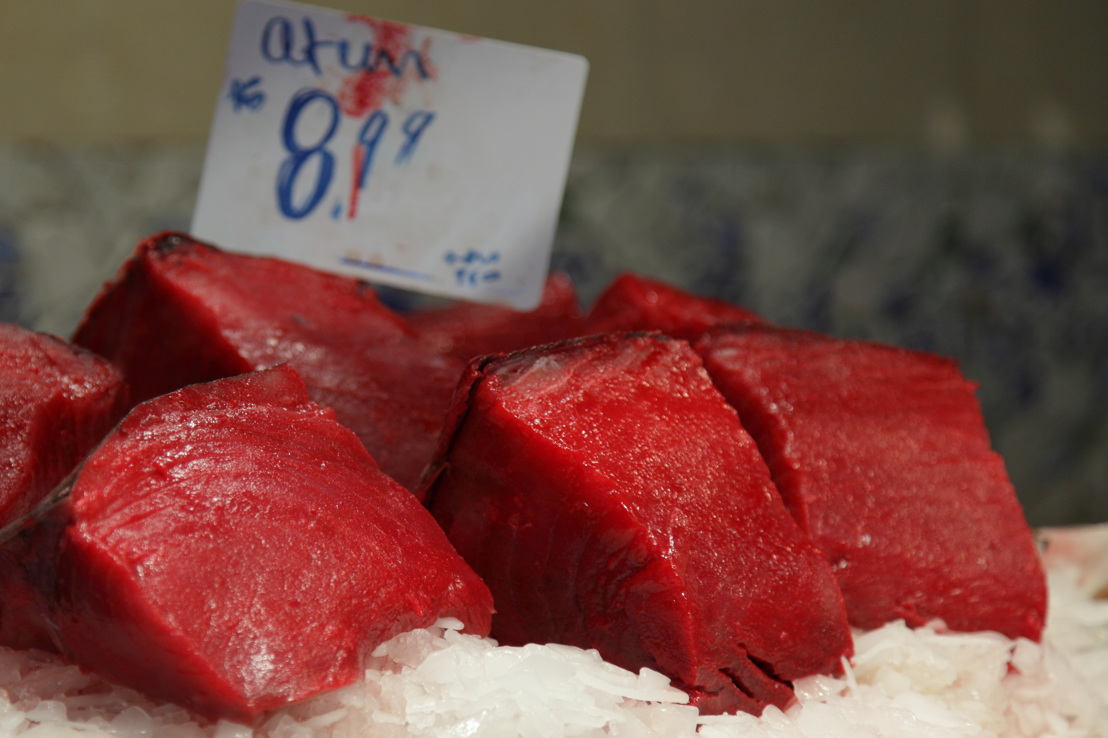 Atún a la venta en el mercado de la Boquería, en Barcelona.